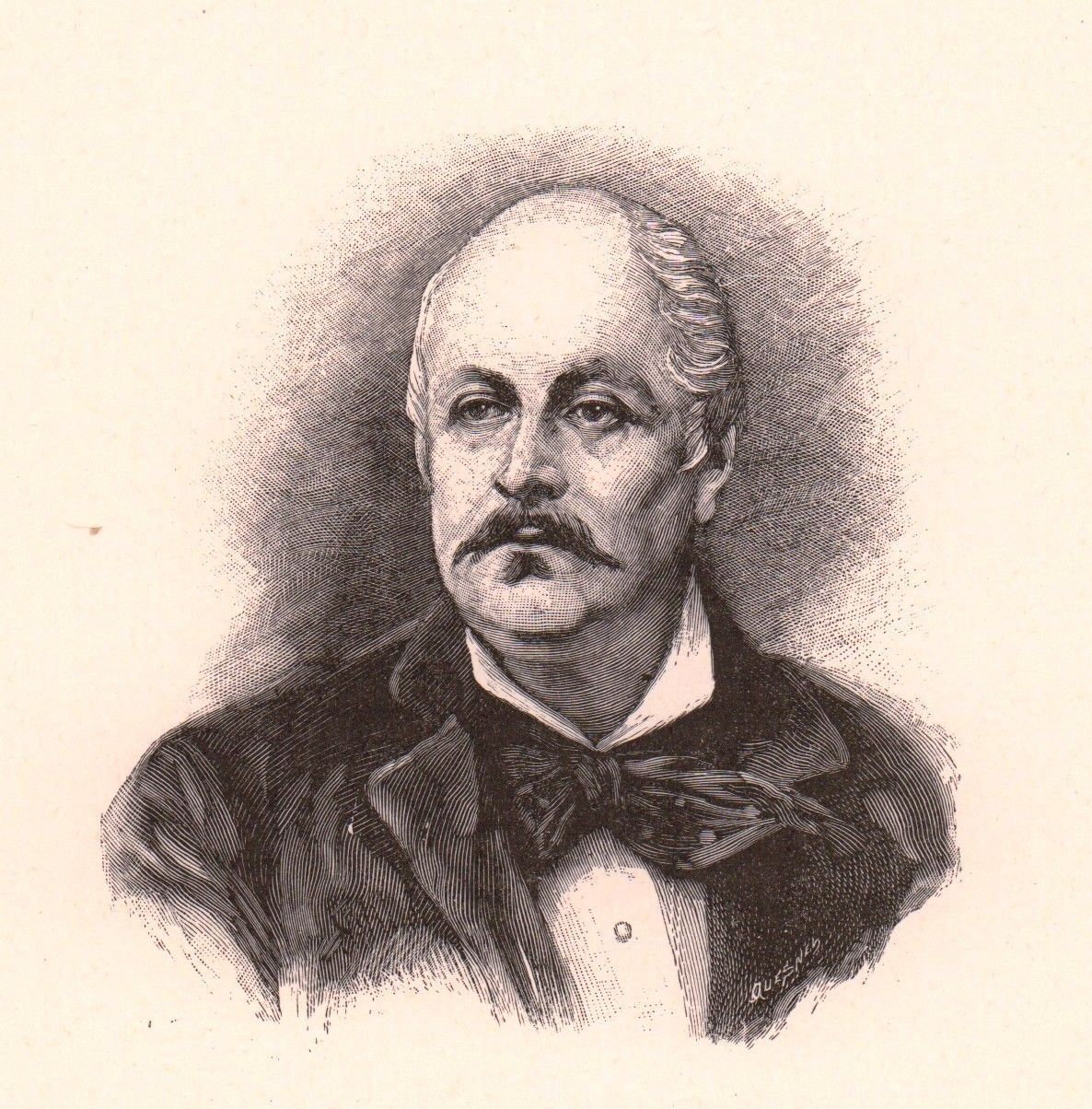 French writer Xavier de Montépin (1823-1902)